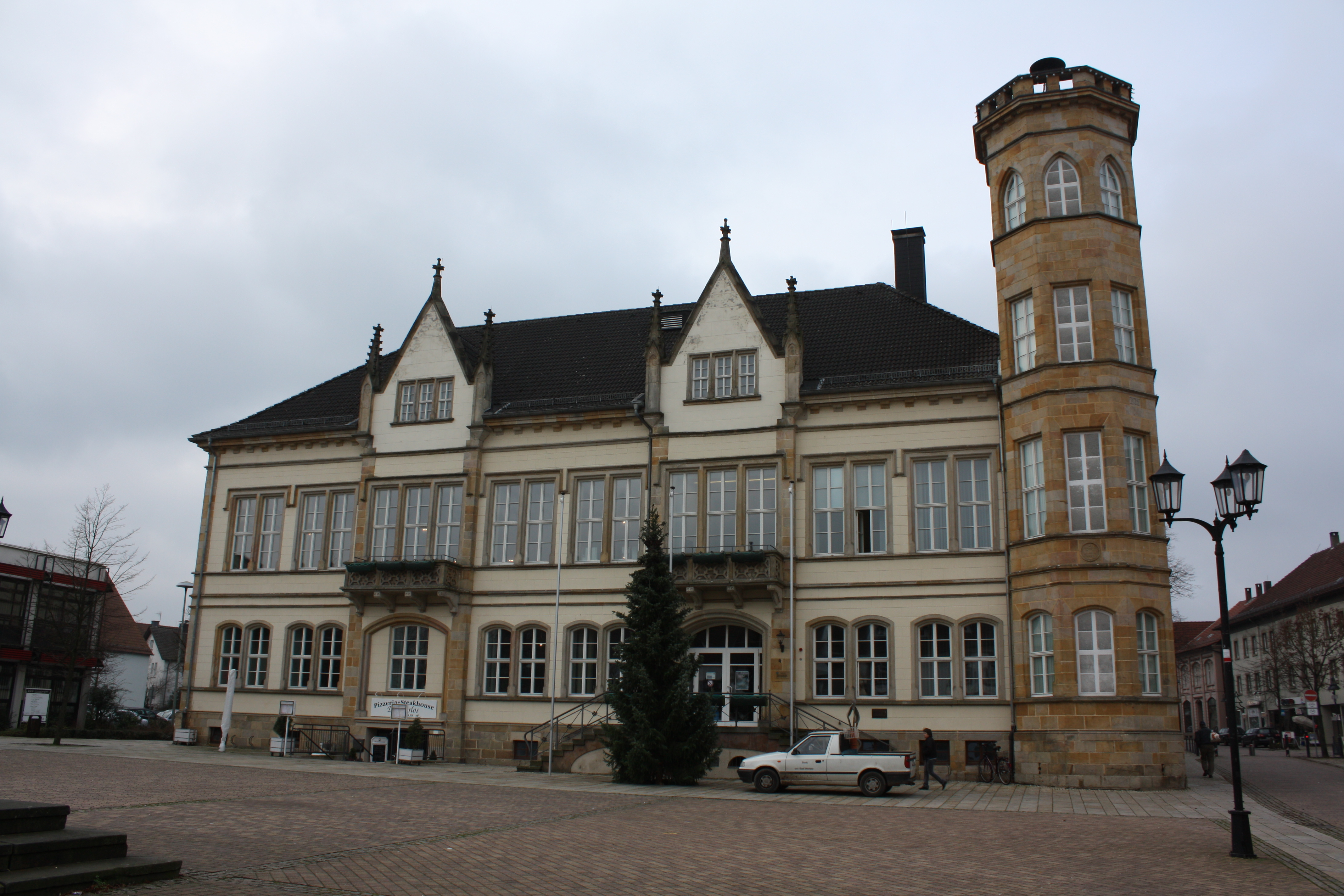 Rathaus in Horn-Bad Meinberg, Frontalansicht